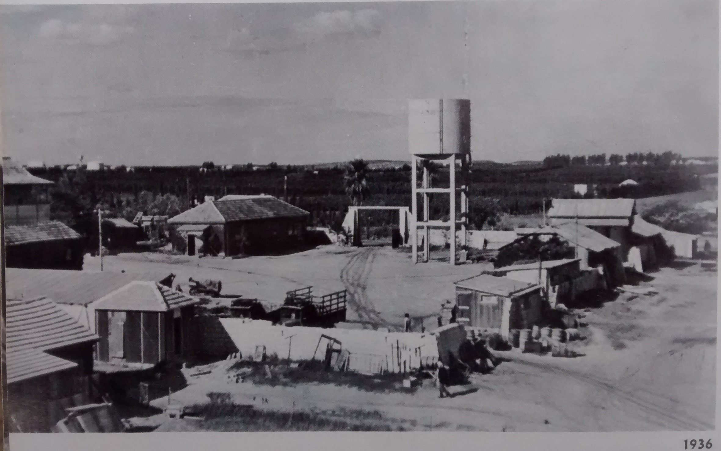 מוזיאון החצר הישנה עין שמר